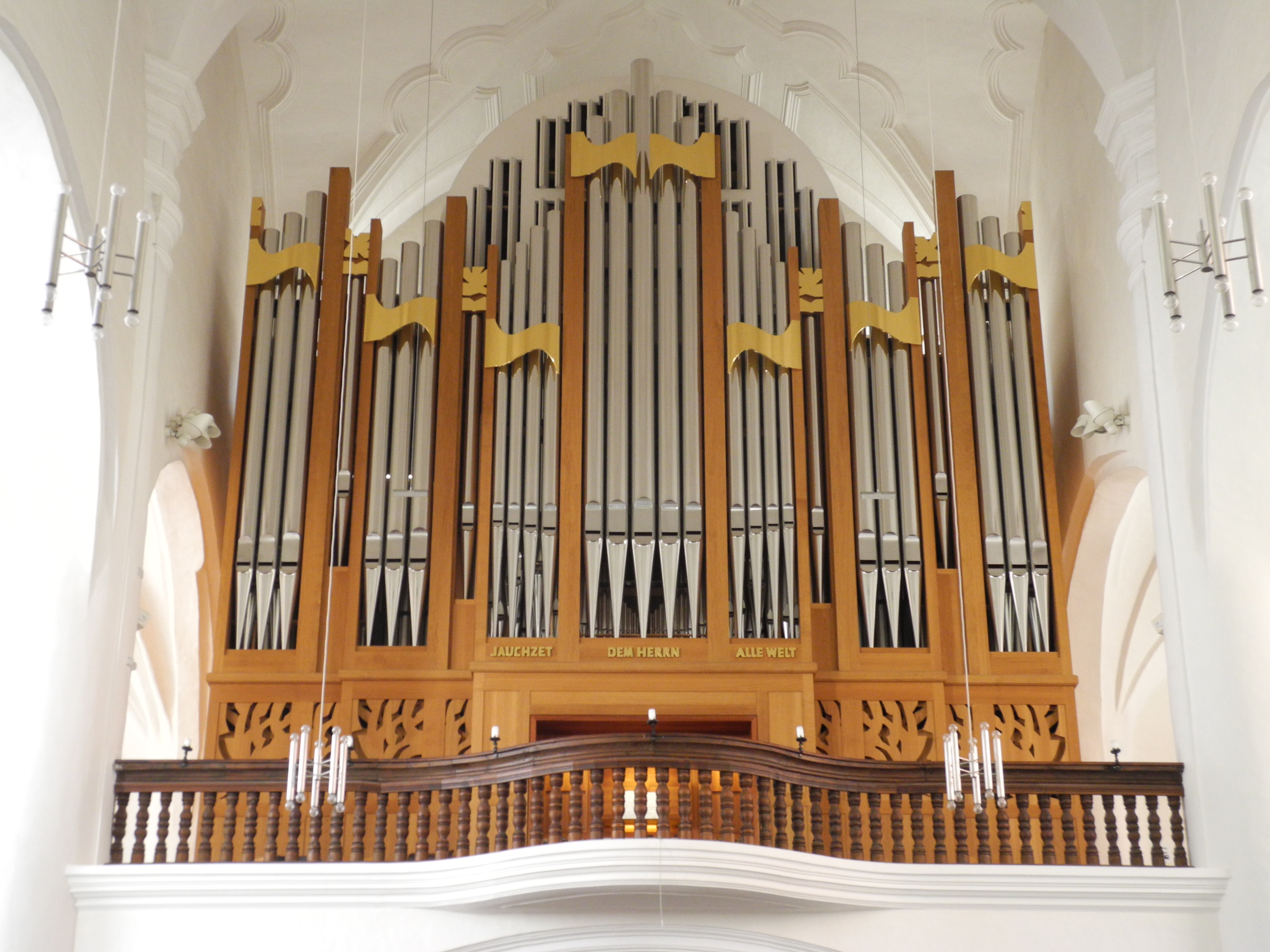 2006 Weimbs (III-P-53)- Max-Reger-Gedächtnisorgel""